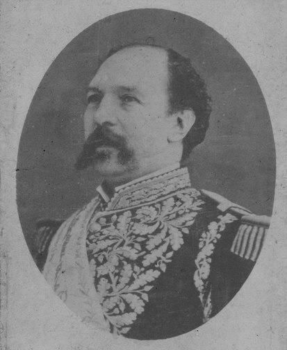 Fotografía oficial del presidente de la República del Ecuador, Gral. Ignacio de Veintimilla (circa 1905).